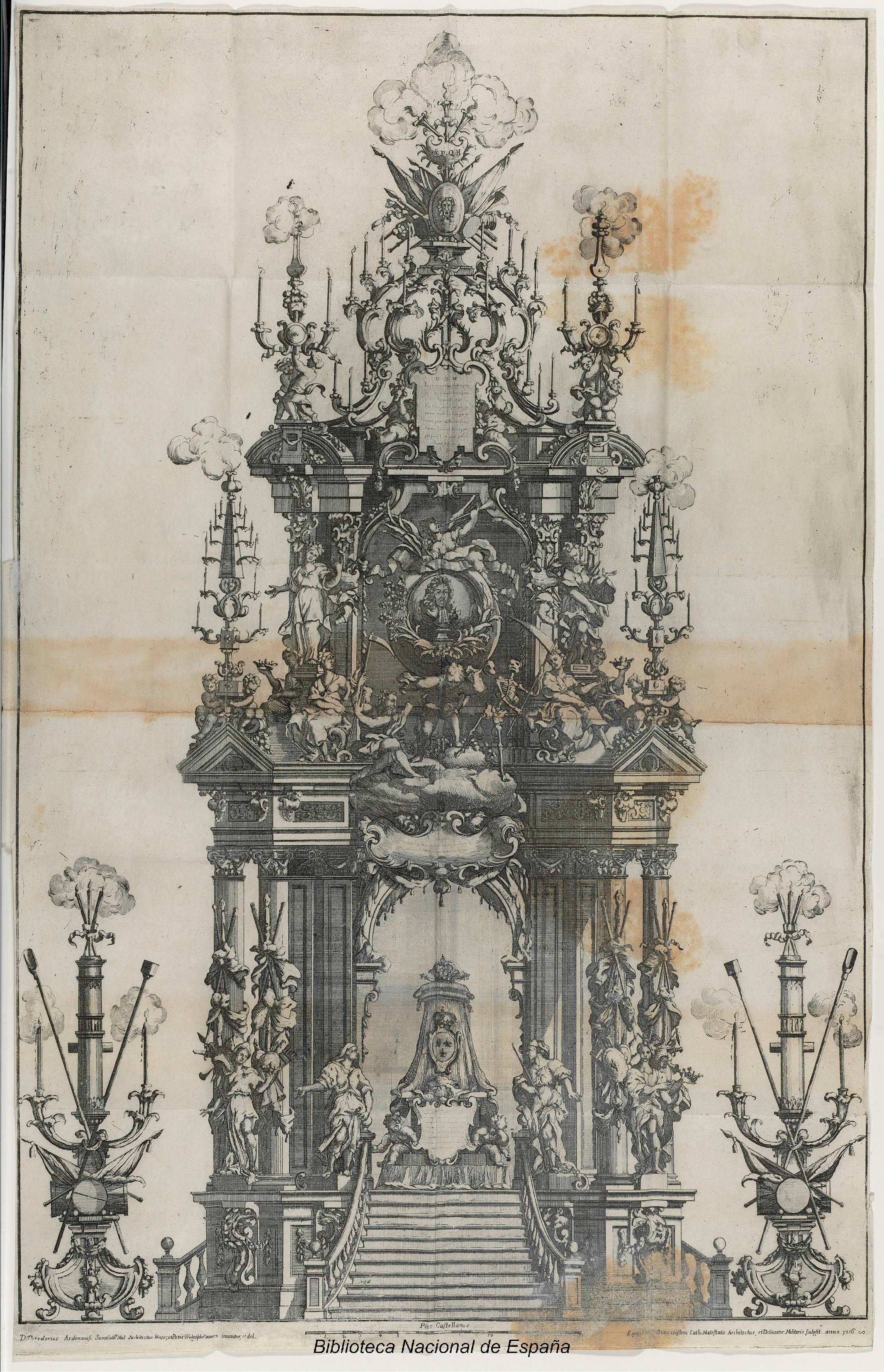 Túmulo alzado en la iglesia del Real Convento de la Encarnación de Madrid con motivo de las exequias por el rey Luis XIV, grabado calcográfico en hoja plegada firmado: D. Theodorus Ardemanusi ... inventor, et del.", "Eques Phil. Pattotta ... sculpsit anno 1716